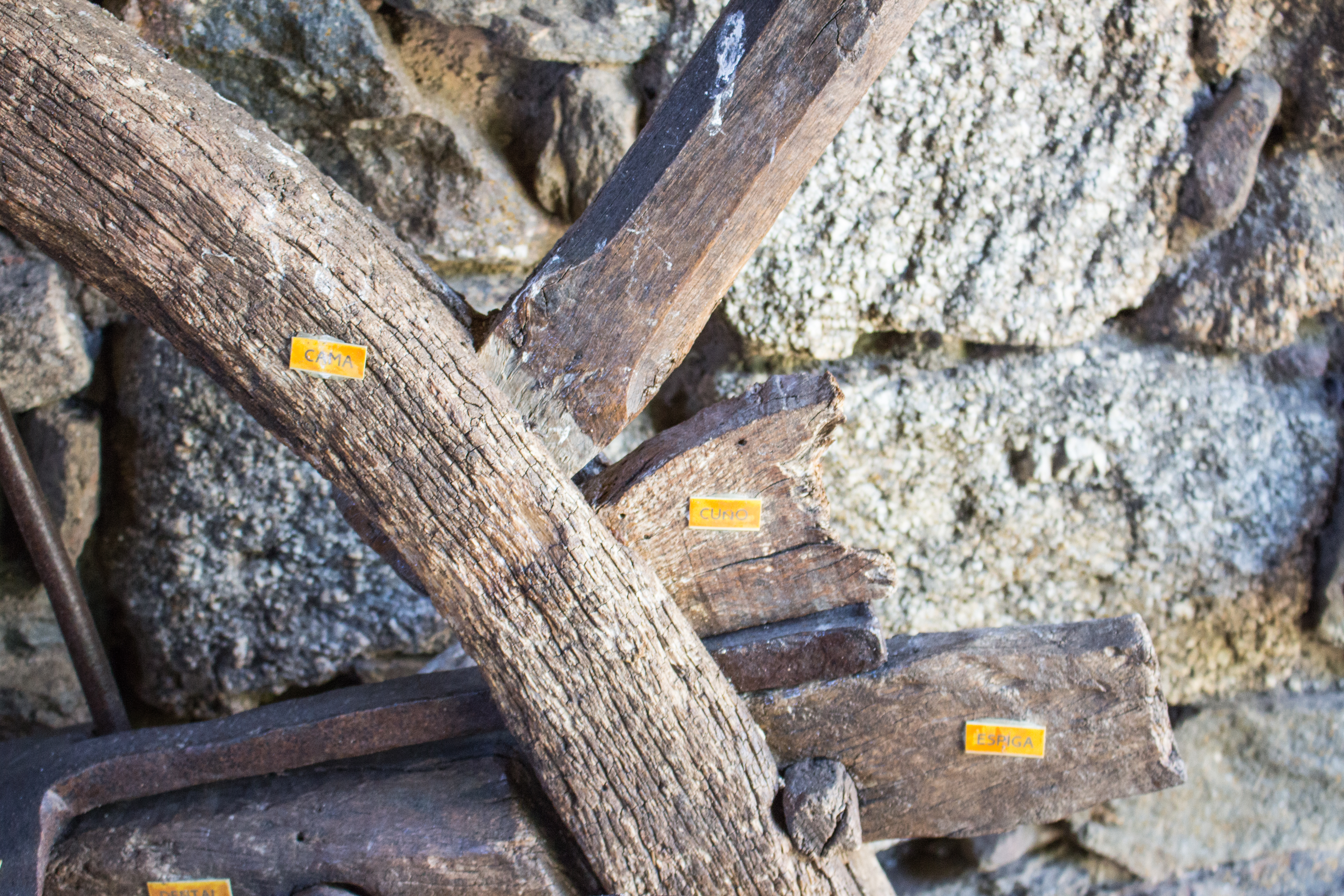 Vista de detalle del cuerpo del arado romano. Se aprecian cuatro partes: cama, cuño, espiga y dental.